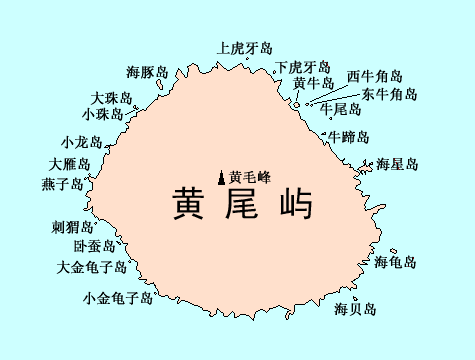 黄尾屿标准地理名称